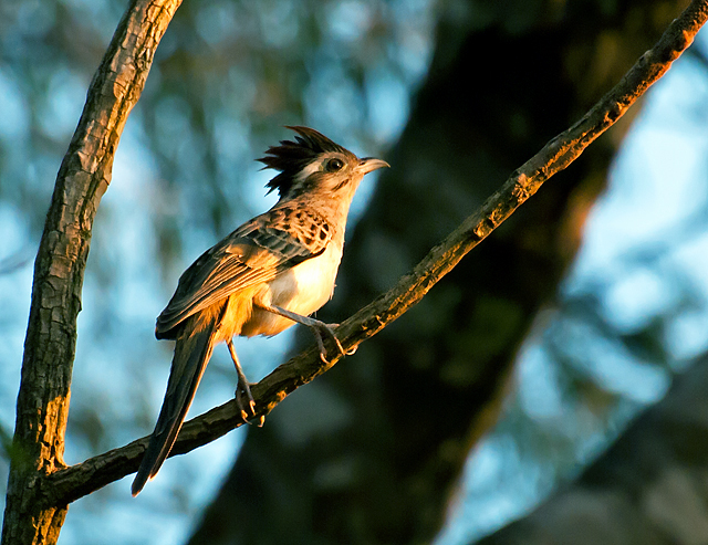 Striped Cuckoo, Tapera naevia -SP - Brasil